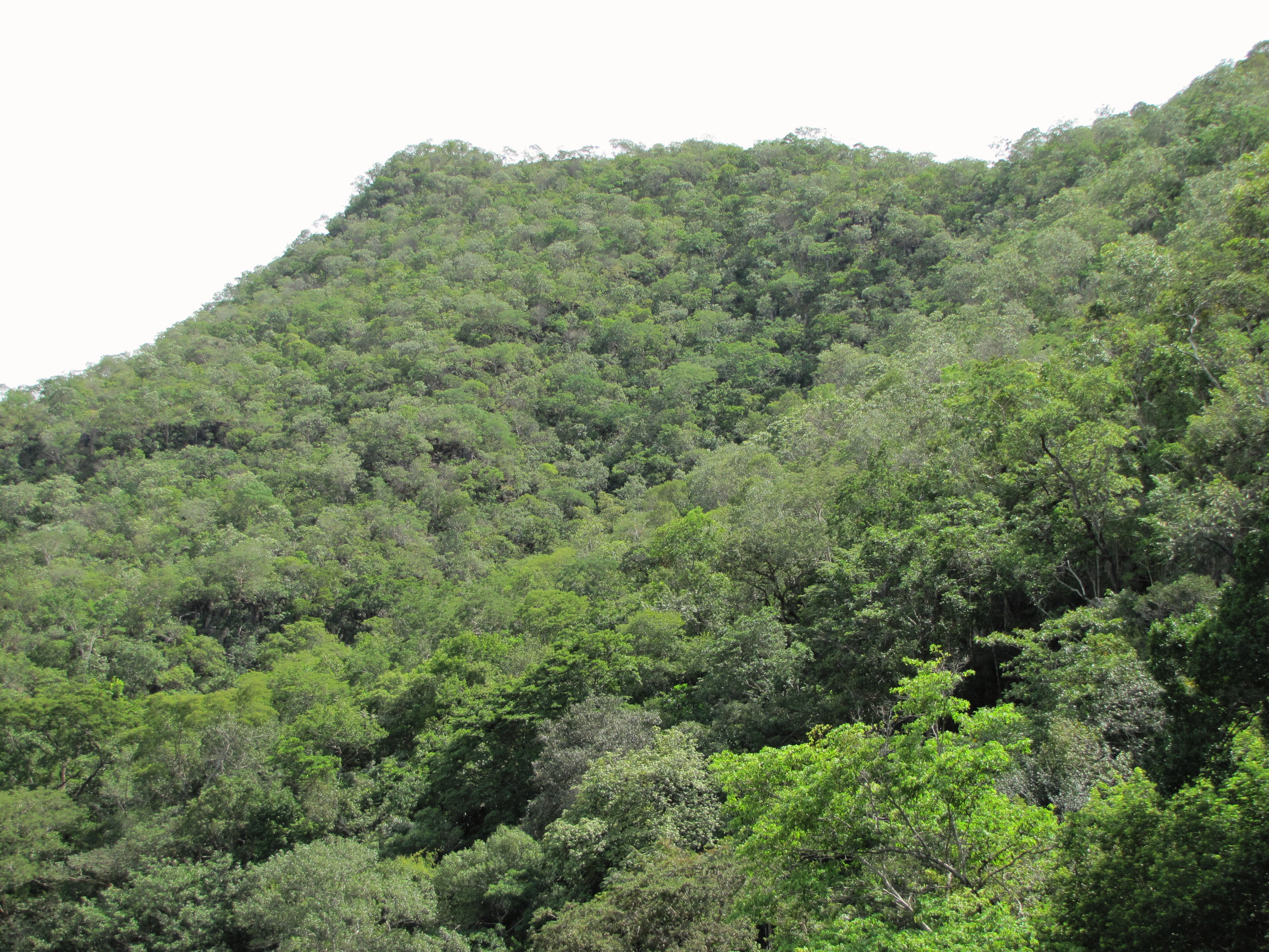 Barra do Garças - MT - Brazil